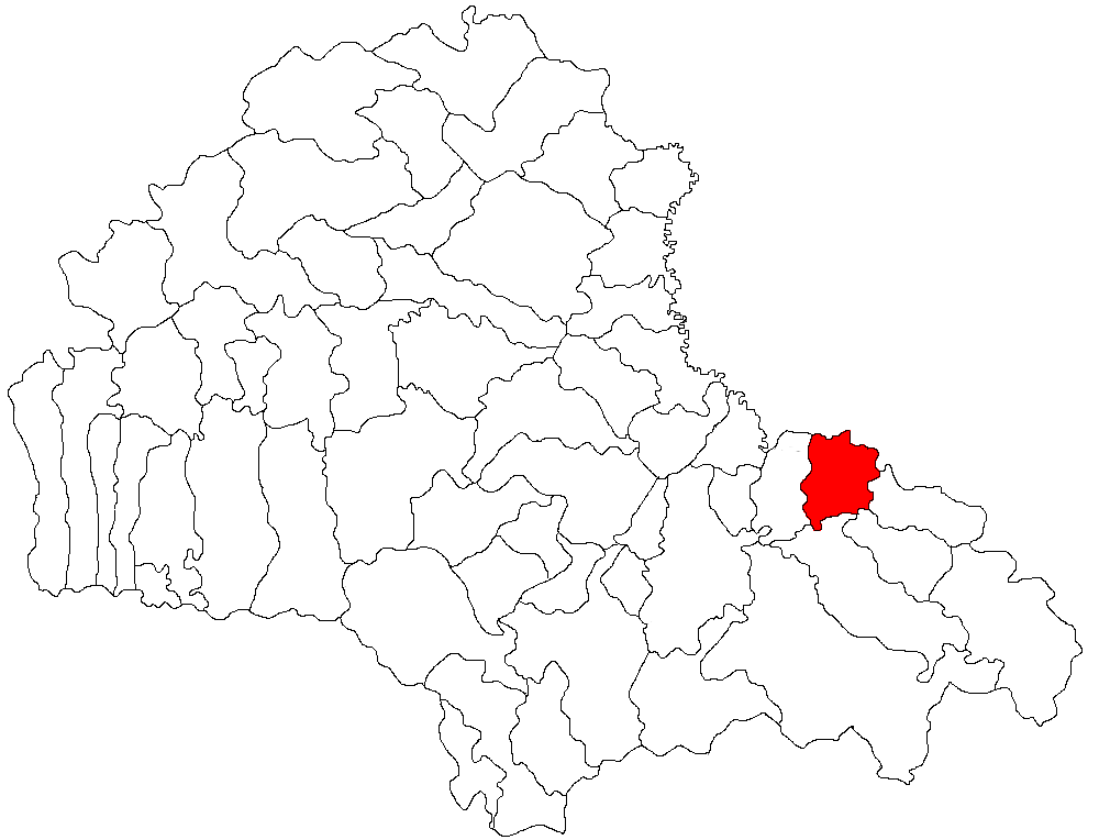 Categorie:Hărţi ale judeţului Braşov